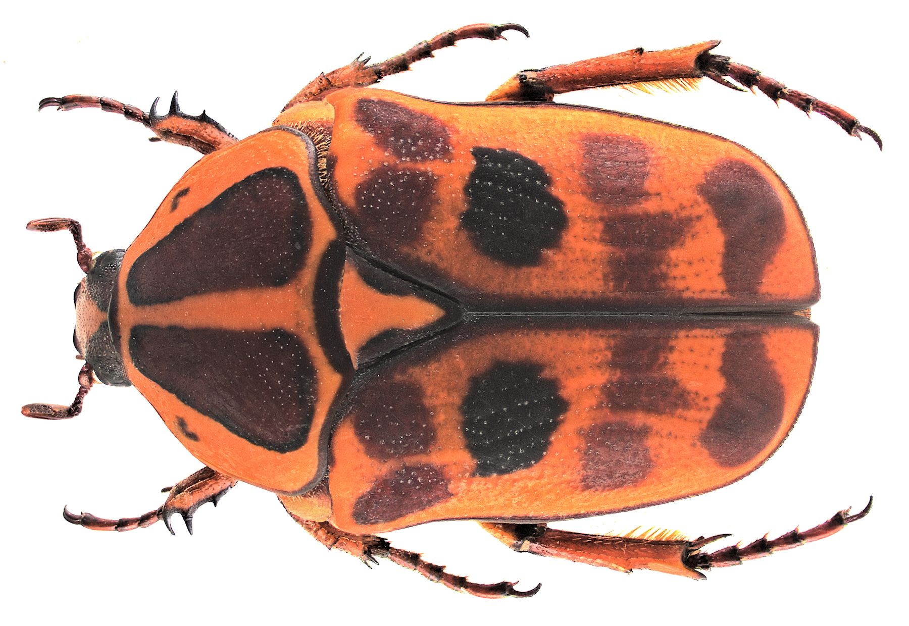 Familie: Scarabaeidae Grösse: 15-19 mm Fundort: Gambia, Serekunda leg. det. U.Schmidt, 1990 Foto: U.Schmidt, 2006